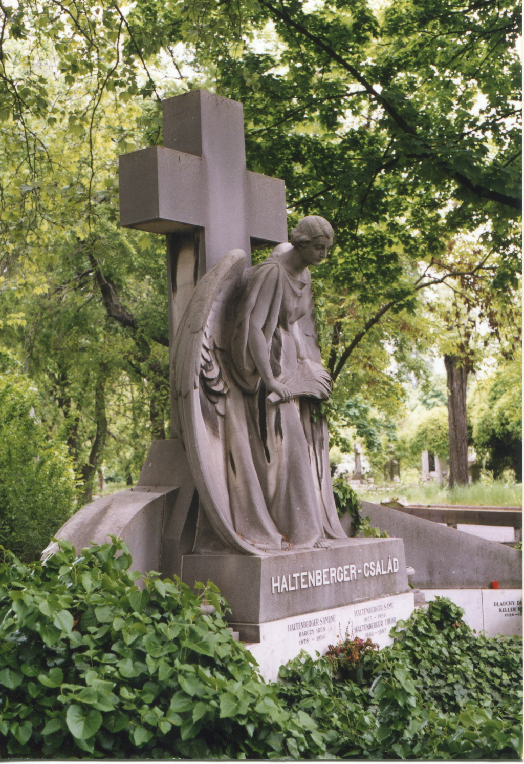 Vastagh Éva: Haltenberger család síremléke (1930), Budapest, Fiumei úti temető